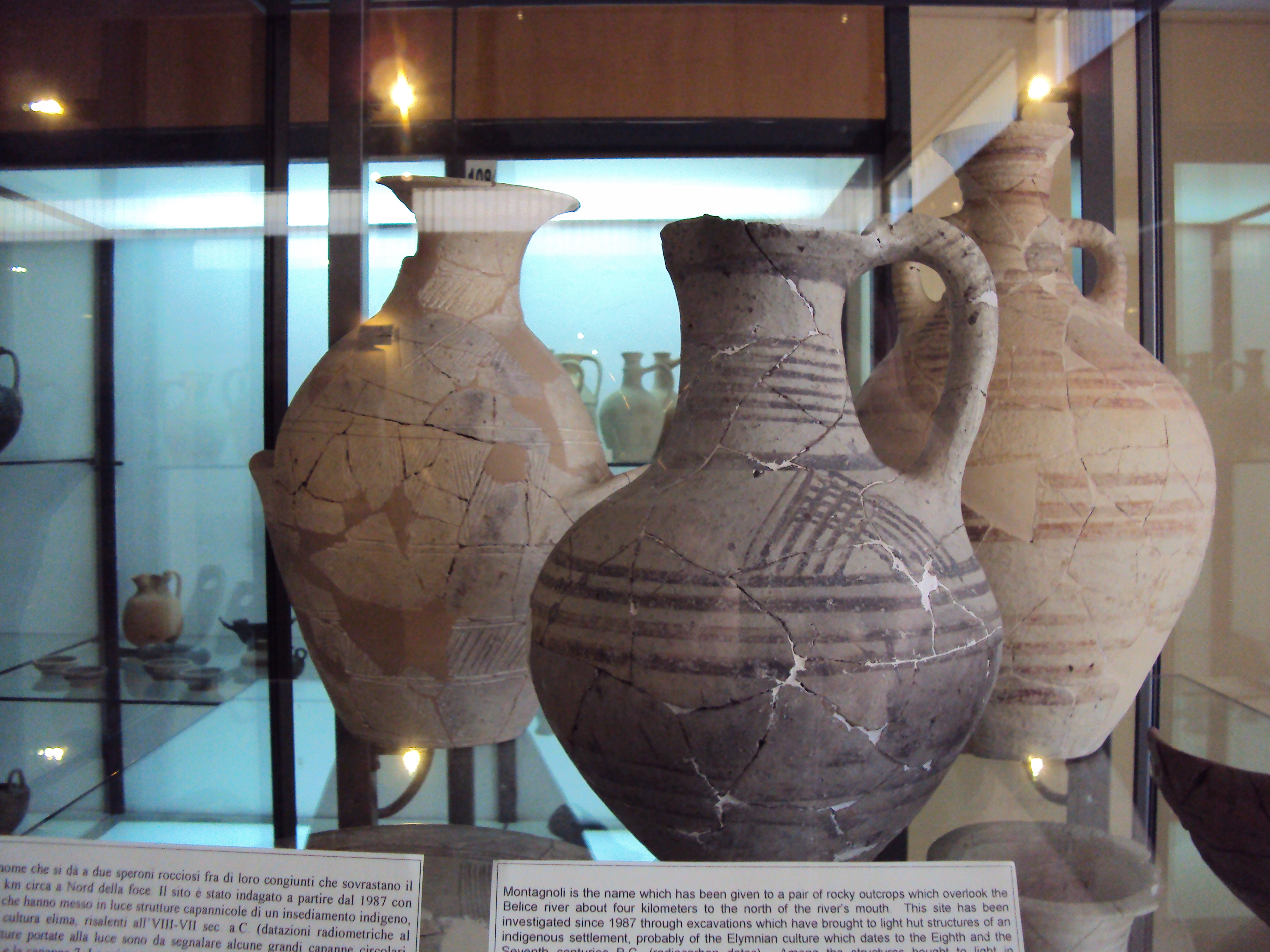 Cimeli del sito archeologico Montagnoli di Belice (Menfi) conservati presso il museo archeologico regionale di Agrigento